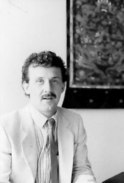 Herbert Rusche 1986 in seinem Bundestagsbüro